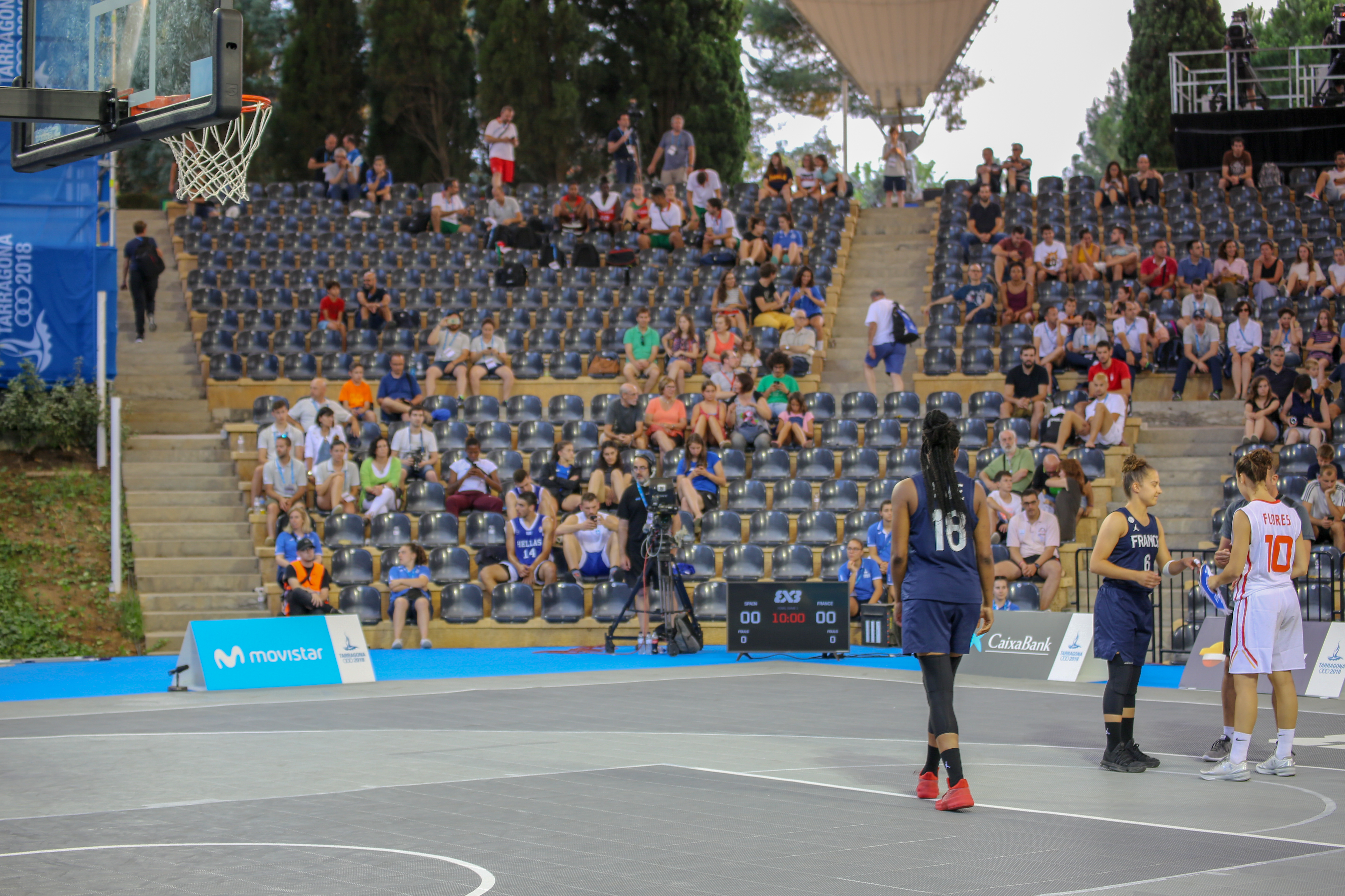 Final femenina de los Juegos del Mediterráneo 2018